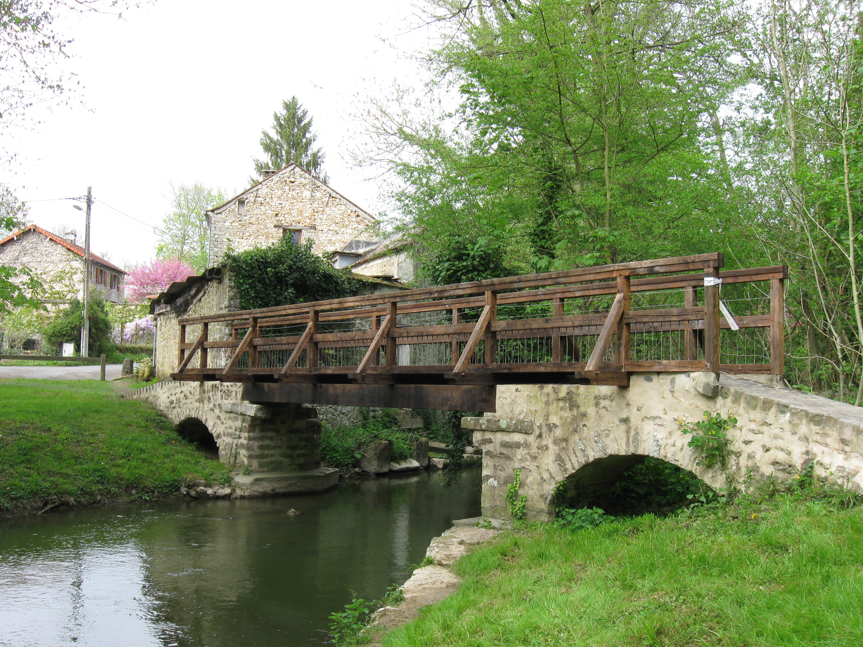 Pont dit de Maincy sur l'Almont en limite des communes de Maincy et Melun. (Seine-et-Marne, région Île-de-France).